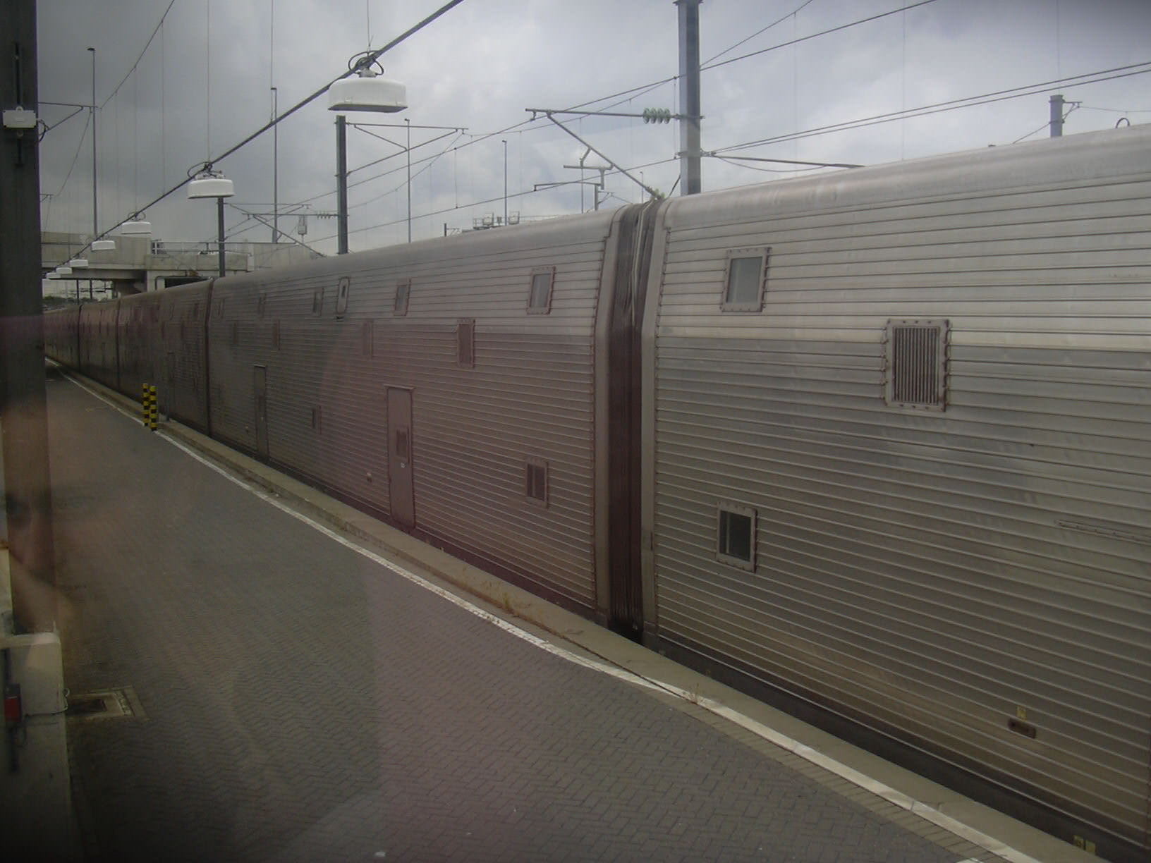 Buszszállító vagonok a Csalagútnál